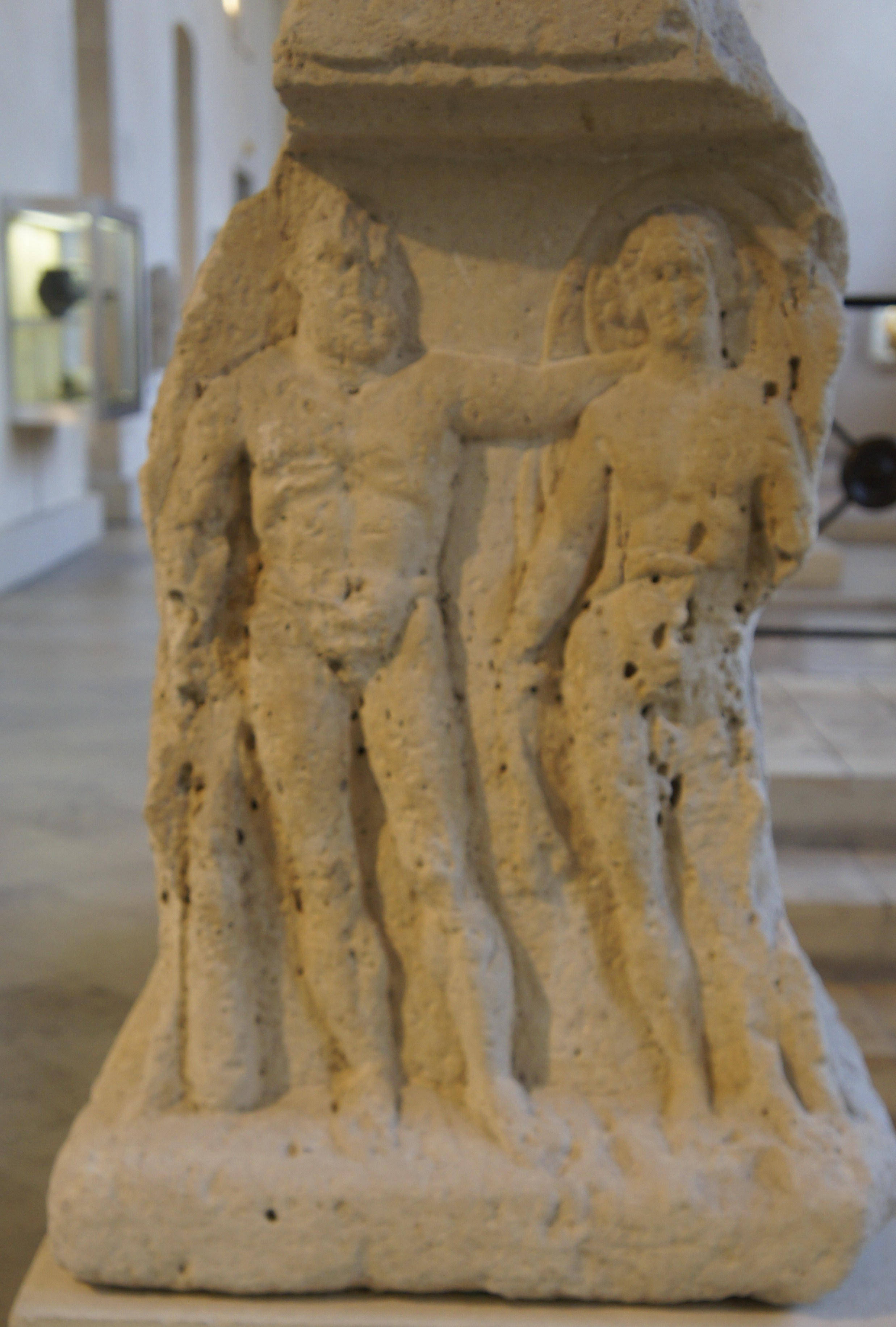 Dans la salle Roman antiquities in Musée Saint-Remi .